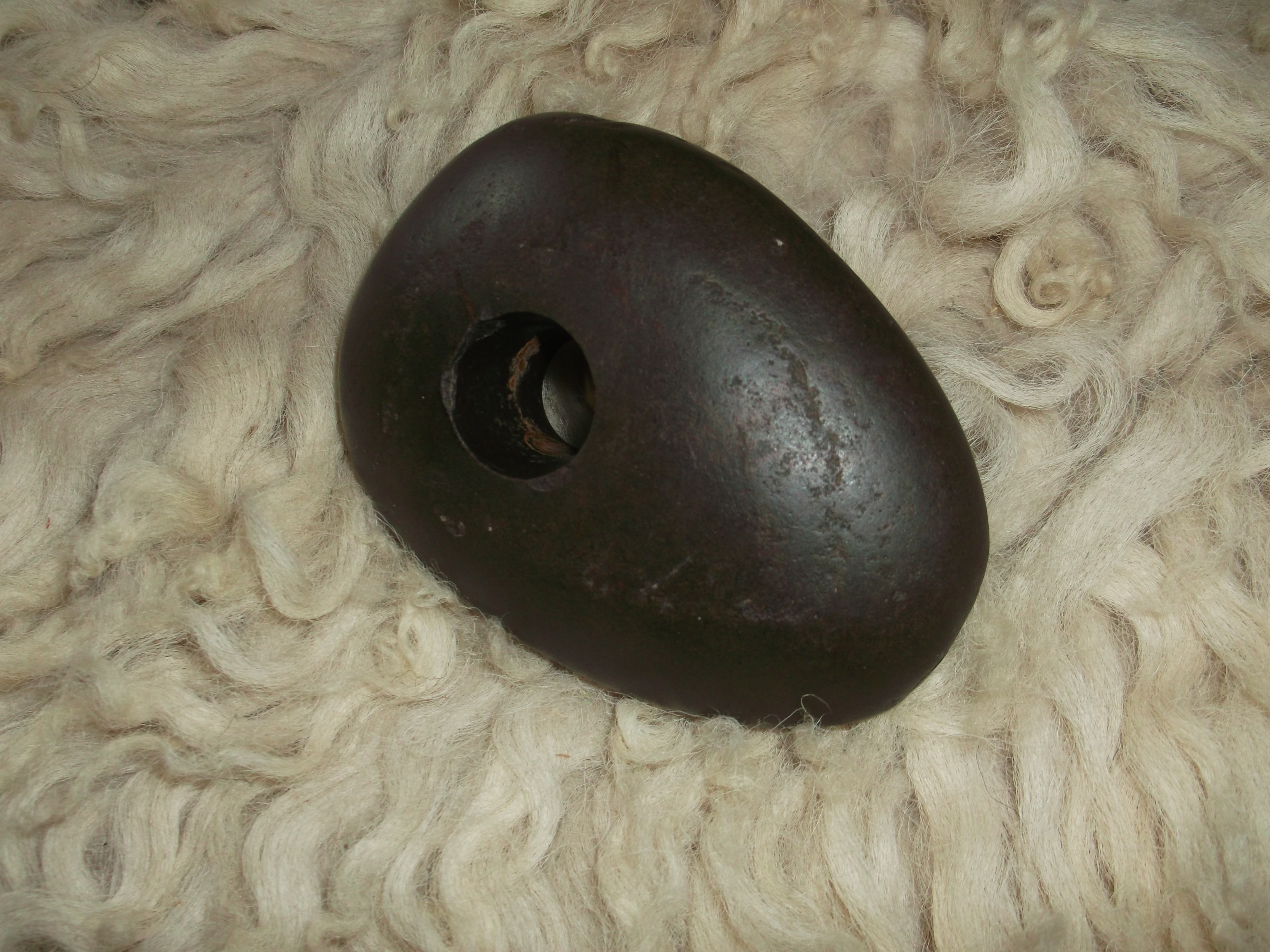 Topor din roca dura de bazalt , slefuit si perforat din neolitic, gasit de un satean in anul 2016 , in urma unor lucrari agricole in afara satului. Dimensiuni : 105 mm.lungime , 35 mm.grosime si 75 mm.latime ,iar orificiul gaurii are forma unui trunchi de con in care baza mare are 20 mm.,iar baza mica 18 mm.